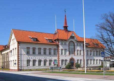 UMAS huvudbyggnad Malmö